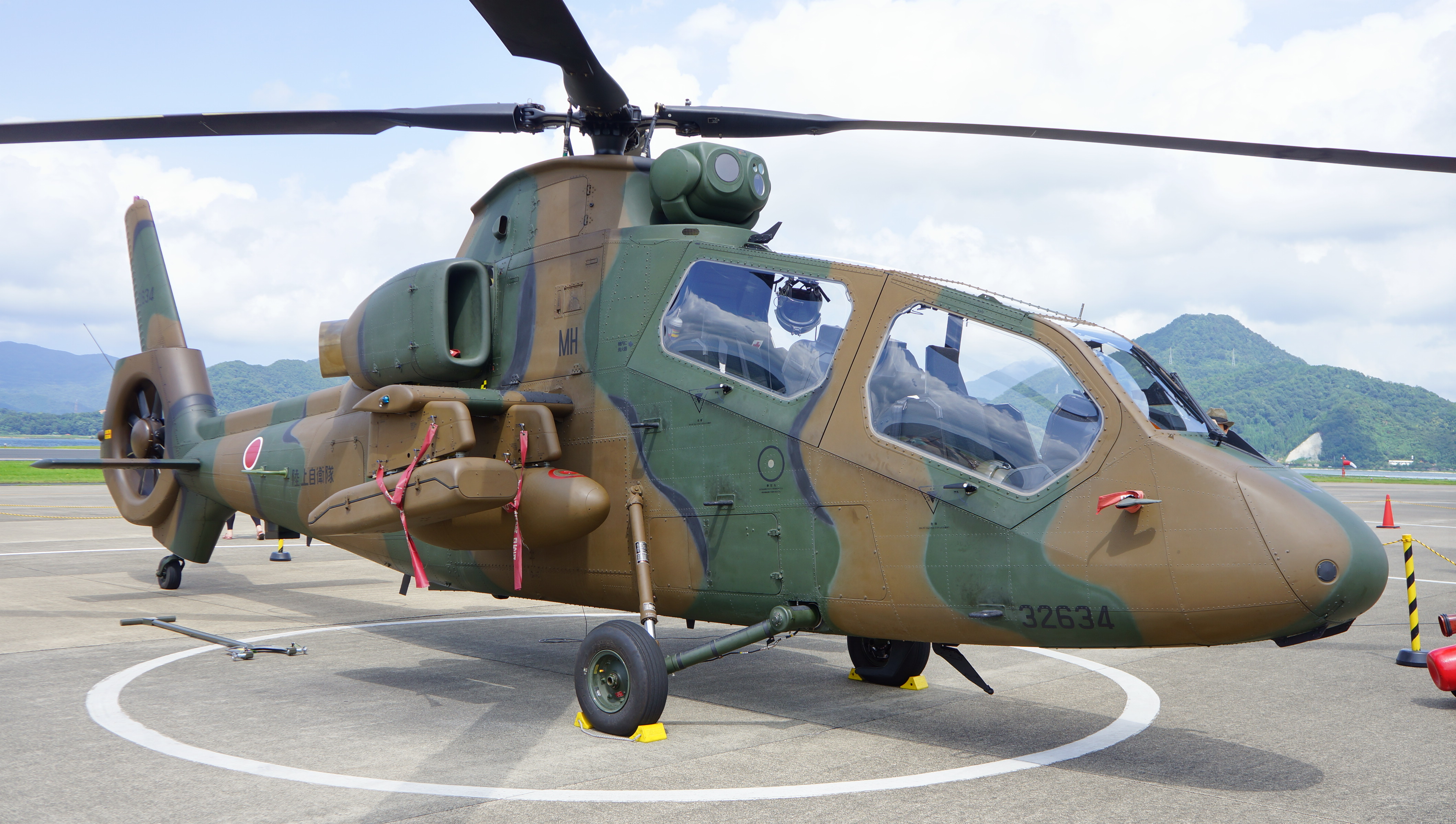 陸上自衛隊 OH-1観測ヘリコプター（32634号機） 右前面。 14年7月27日 海上自衛隊舞鶴航空基地にて。